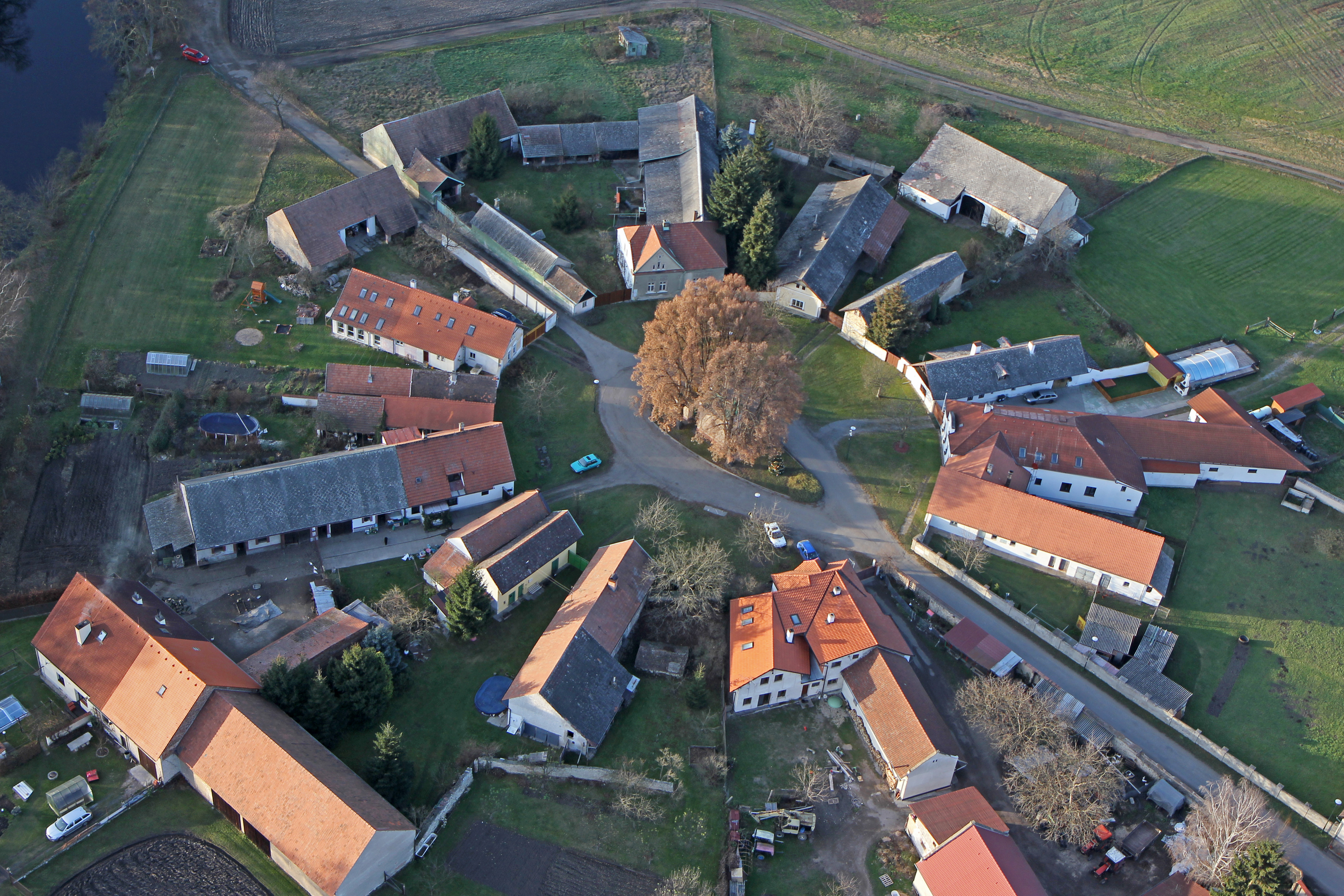 letecký snímek obce Byšičky